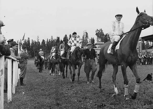 Øvrevoll Galoppbane racecourse